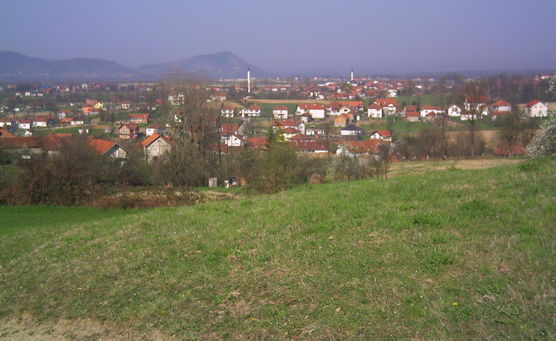 Pogled na Bulatovce sa lokaliteta Mramorje